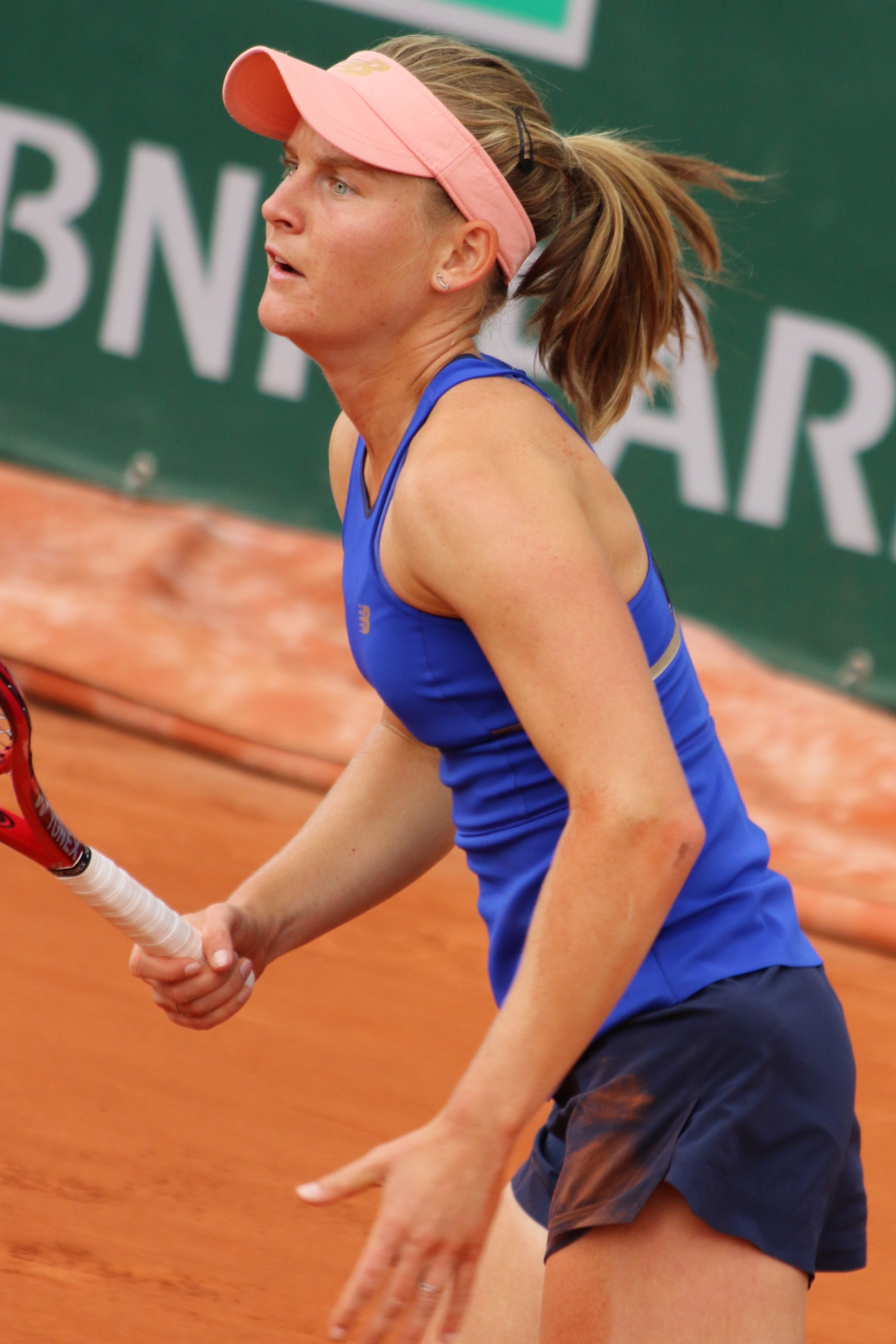 Ferro RG19 (10)